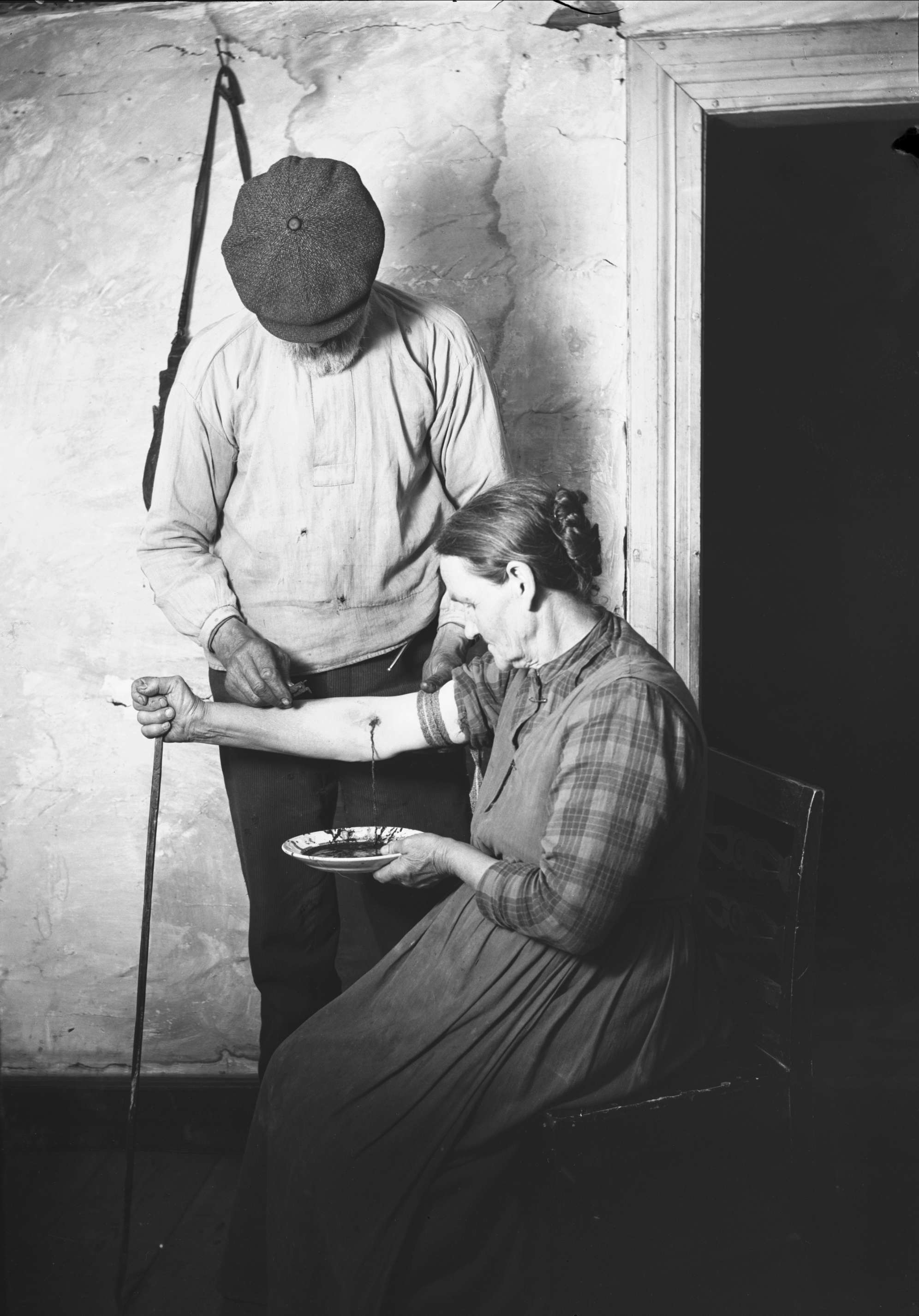 Sjukvård, åderlåtning. Äldre kvinna har snört åt armen och låter blod rinna från ett hål i armvecket ner på ett fat. Hon får hjälp av en man som står vid hennes sida. Värmland, Mangskogs socken.